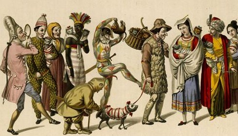 I gatti in fasce : Les chats en bande. Scène du Carnaval de Rome.